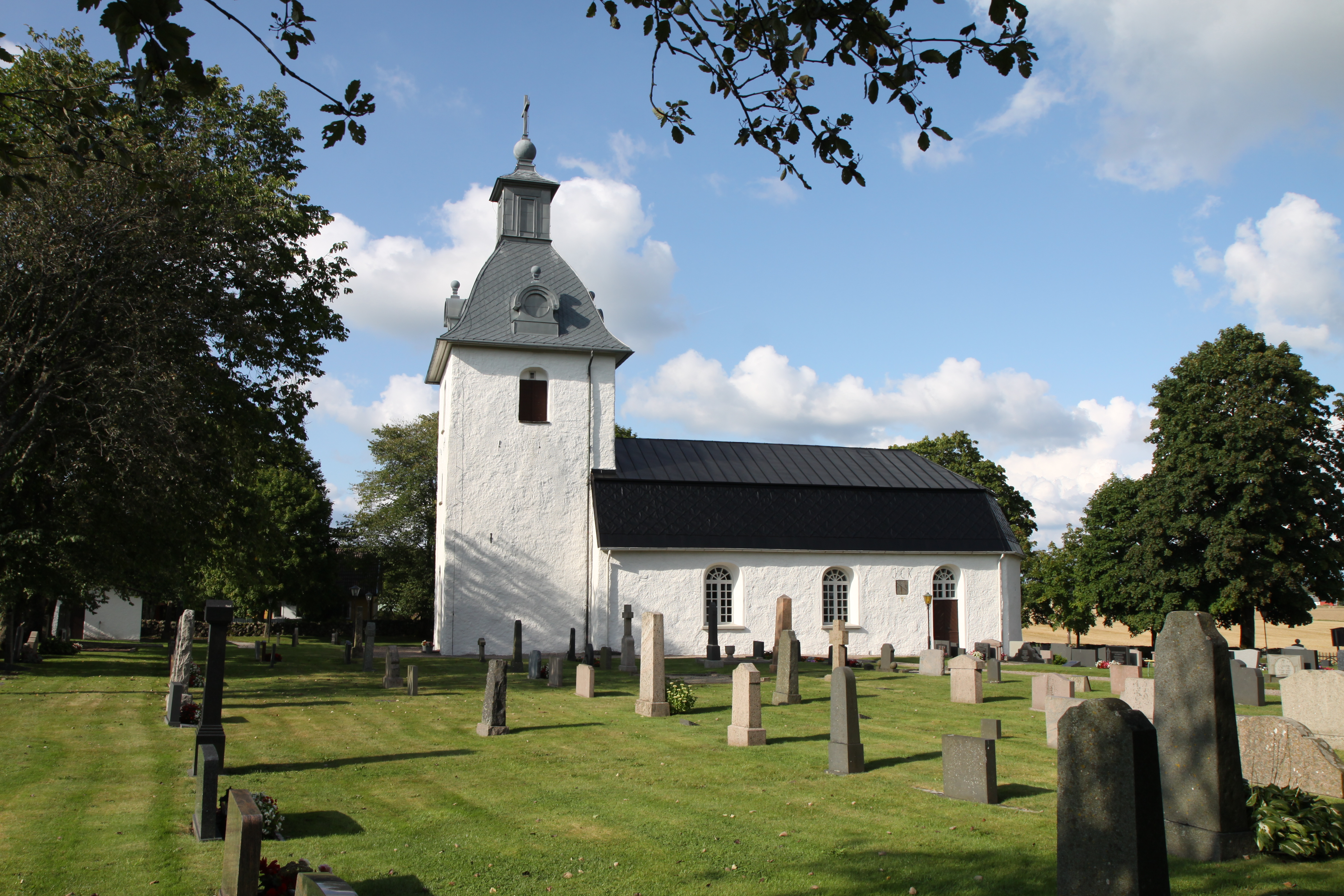 Askome kyrka